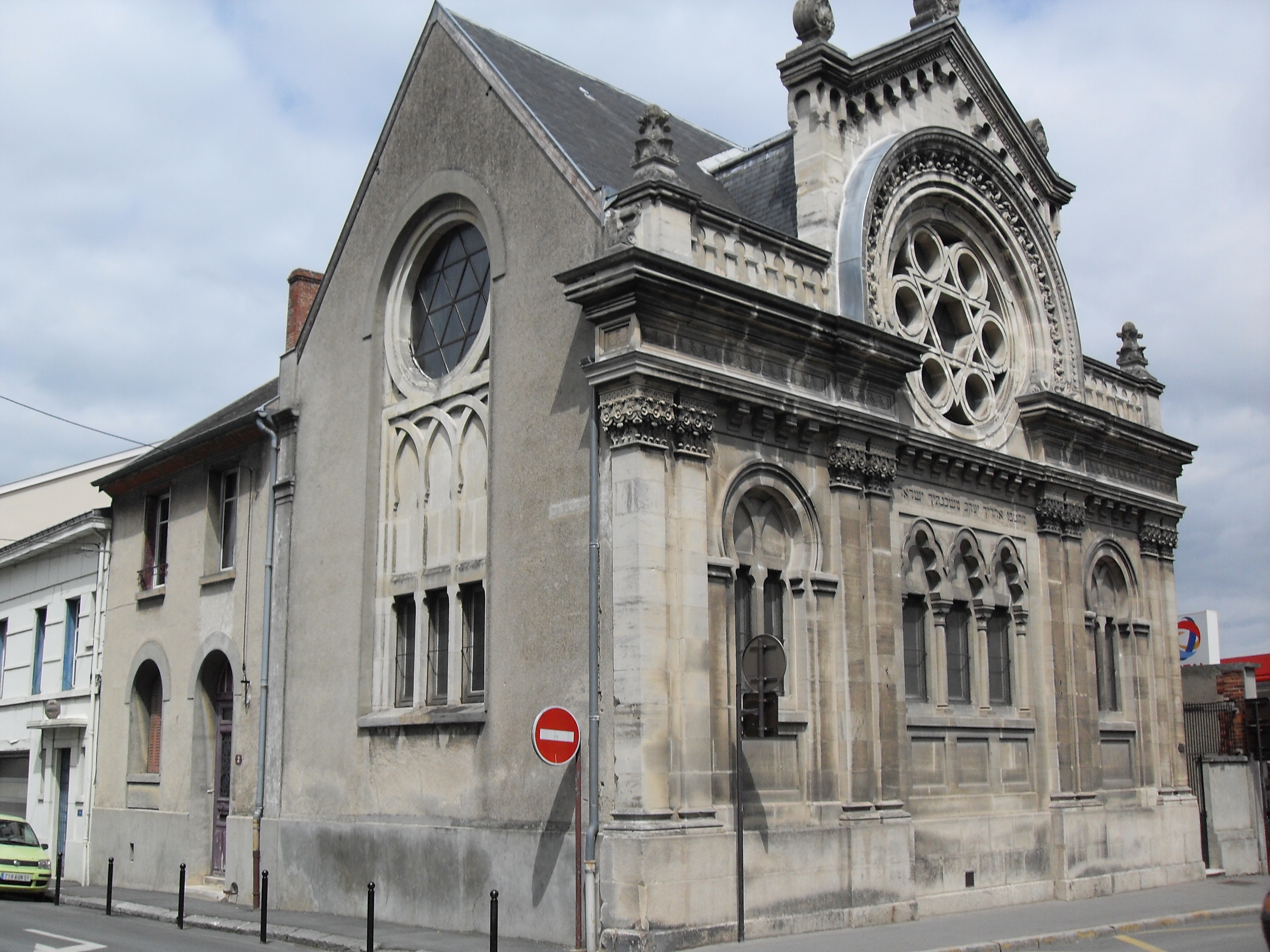 Épernay (Marne, Champagne-Ardenne, France) - Synagogue Vue générale. En dessous de la rosace est gravé en hébreu le verset biblique Nombres 24,5 : "Qu'elles sont belles tes tentes, ô Jacob, tes demeures, ô Israël!"